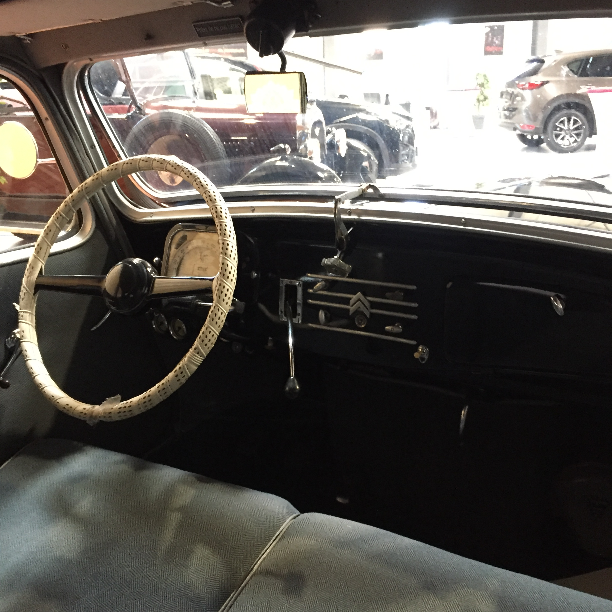 Citroen TA Armaturenbrett